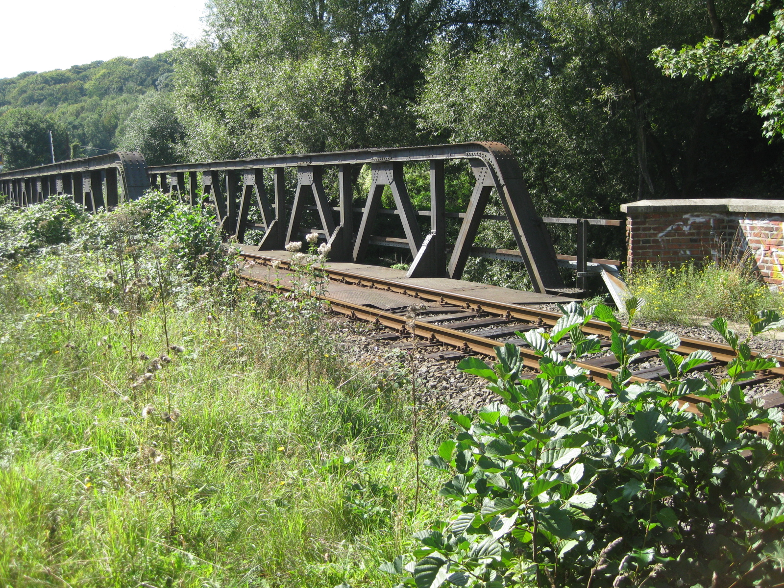 Ehemaliger Haltepunkt Röhe an der Talbahnlinie mit Brücke über die Inde, Stadt Eschweiler, Städteregion Aachen, Nordrhein-Westfalen